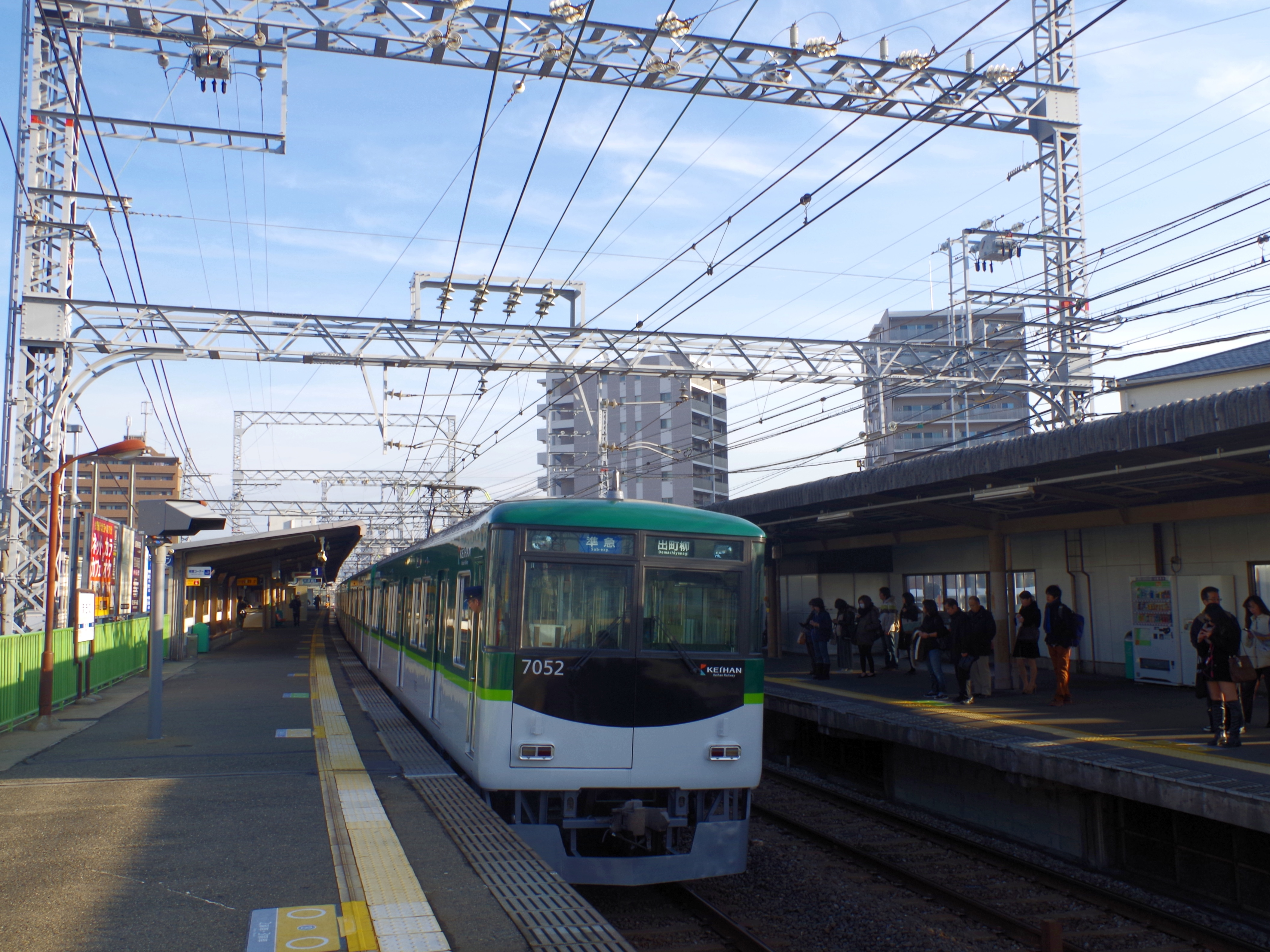 京阪本線 牧野駅 Makino station 2012.12.17